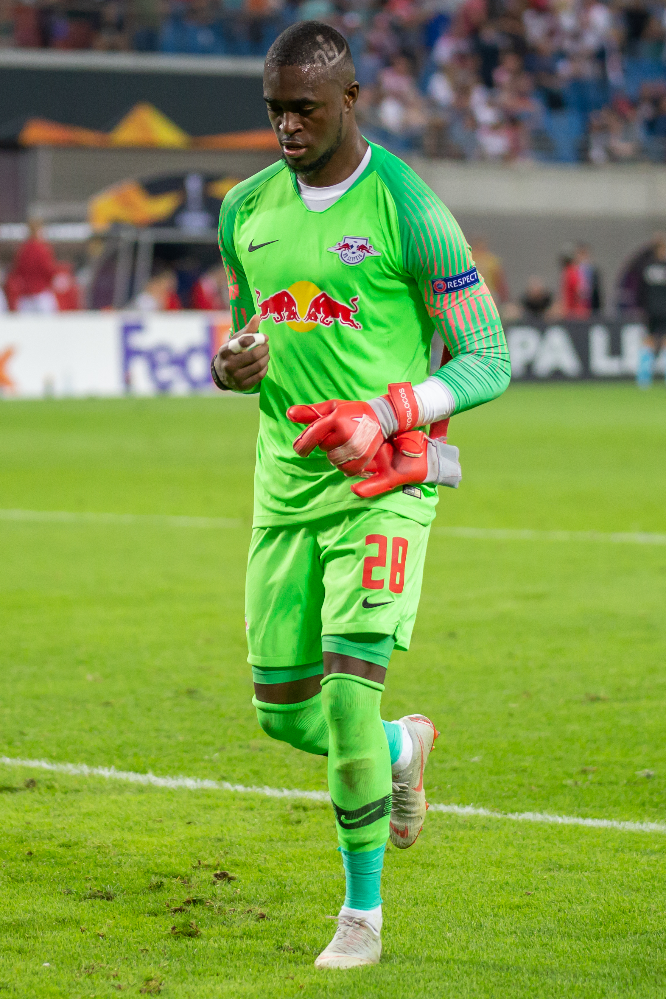 Yvon Mvogo (RB Leipzig, 28, Torwart, goalkeeper); Portrait, Porträt; Einzelbild